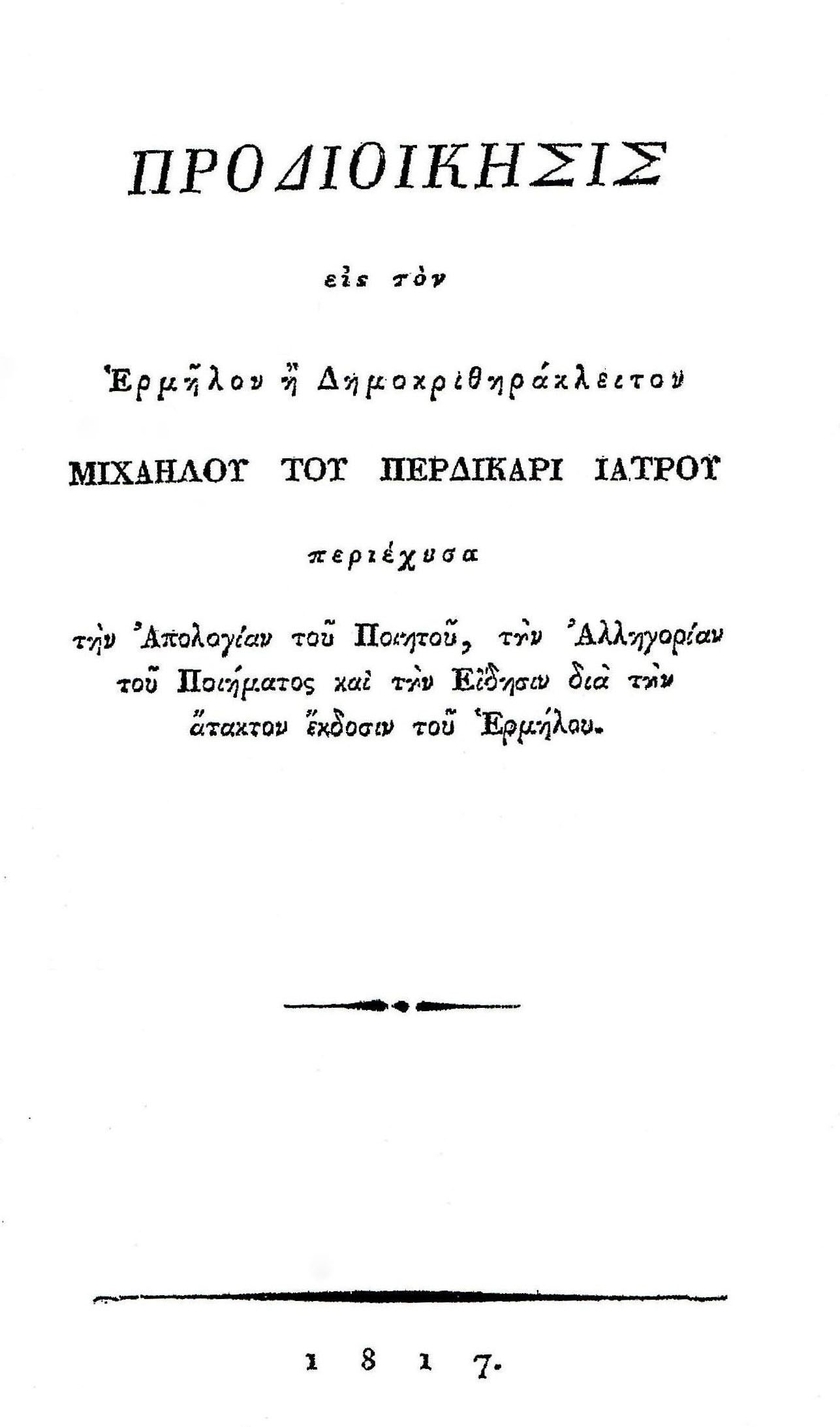 Η σελίδα εξώφυλλου του βιβλίου "Προδιοίκησις εις τον Ερμήλον ή Δημοκριθηράκλειτον", που τυπώθηκε σχεδόν ταυτόχρονα με τον "Ερμήλο".